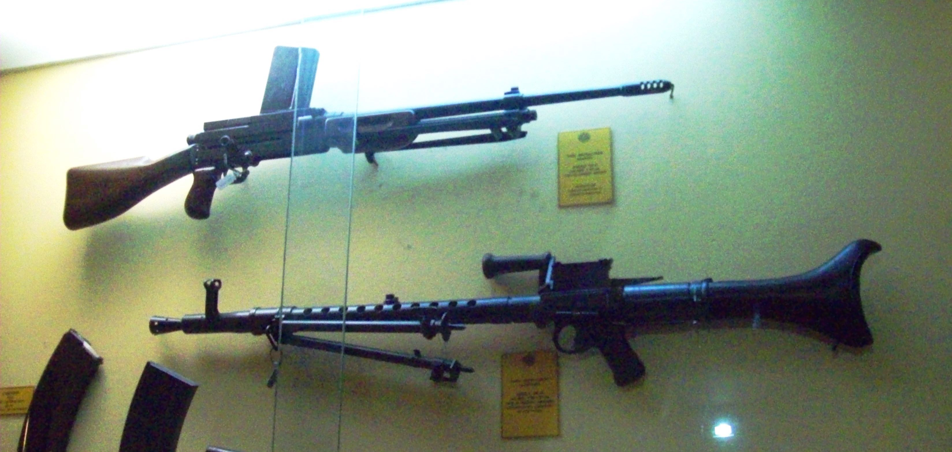 Armamento expuesto en el Museo de Armas de la Nación, ciudad de Buenos Aires, Argentina 2014.